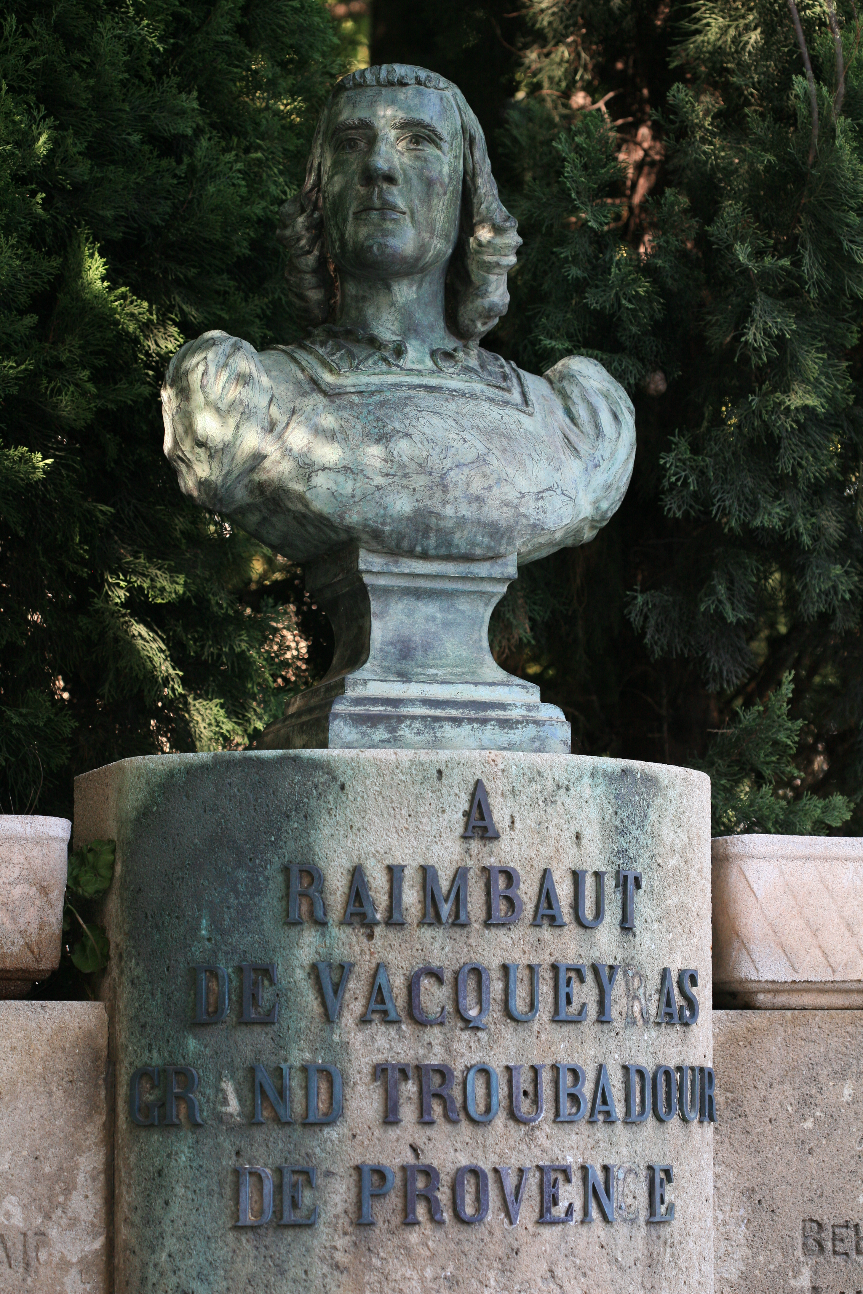 Raimbaud de Vacqueyras, France